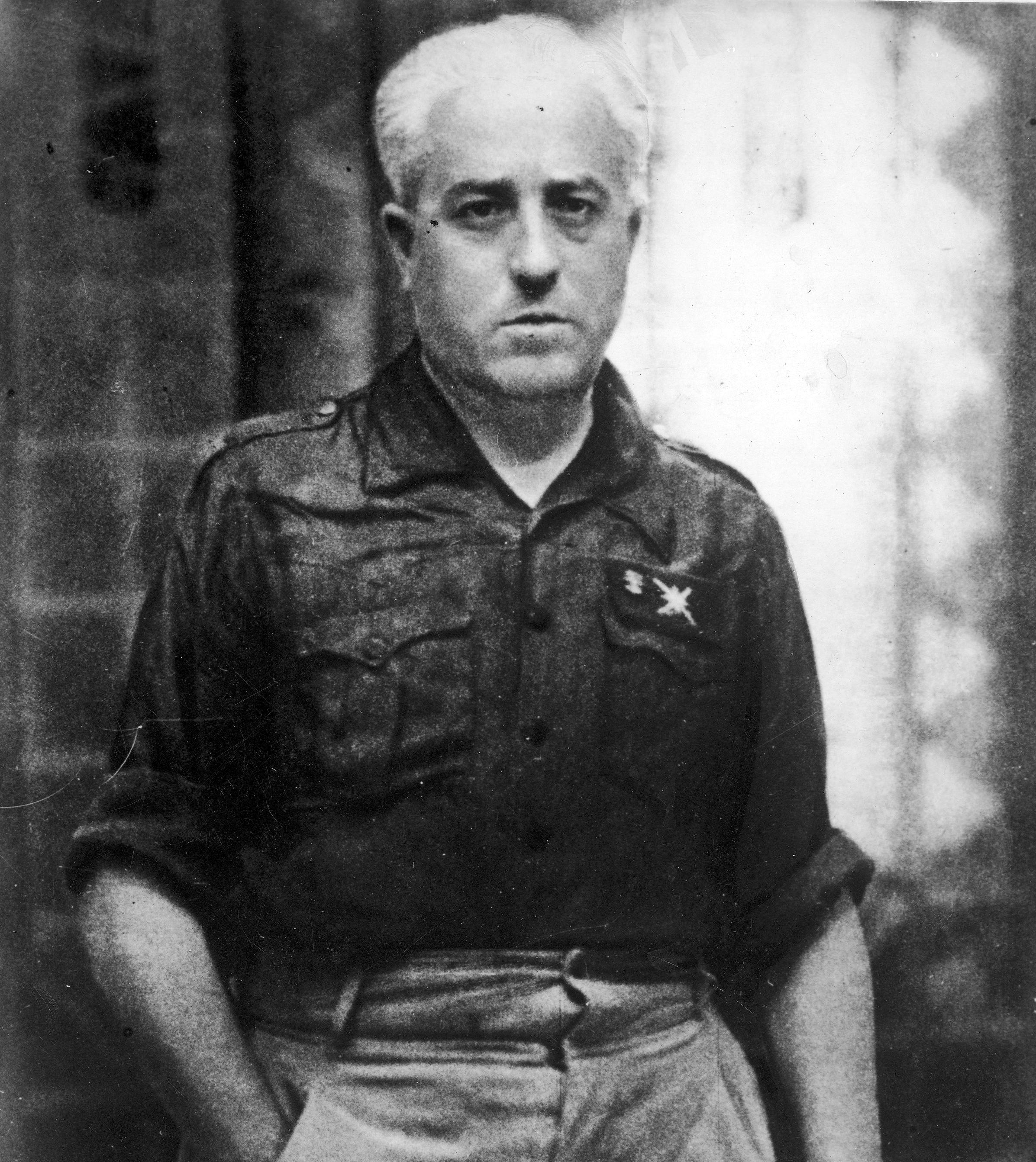 Retrato del general Juan Yagüe.